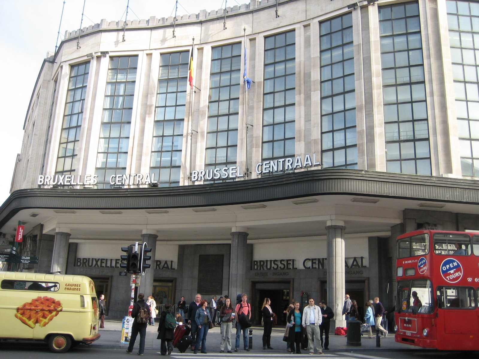 D'Gare Centrale vu Bréissel; Haaptentrée. 2006-10-08.